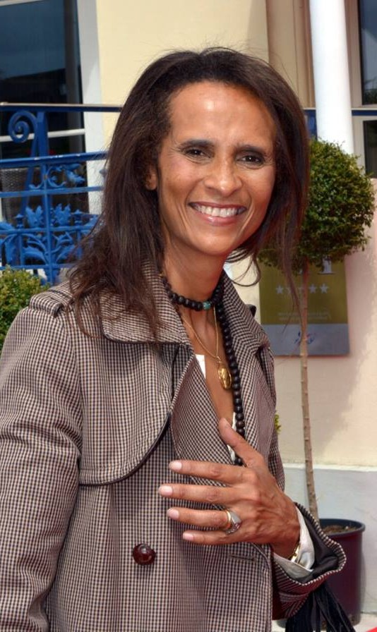 Karine Silla au festival de Cabourg